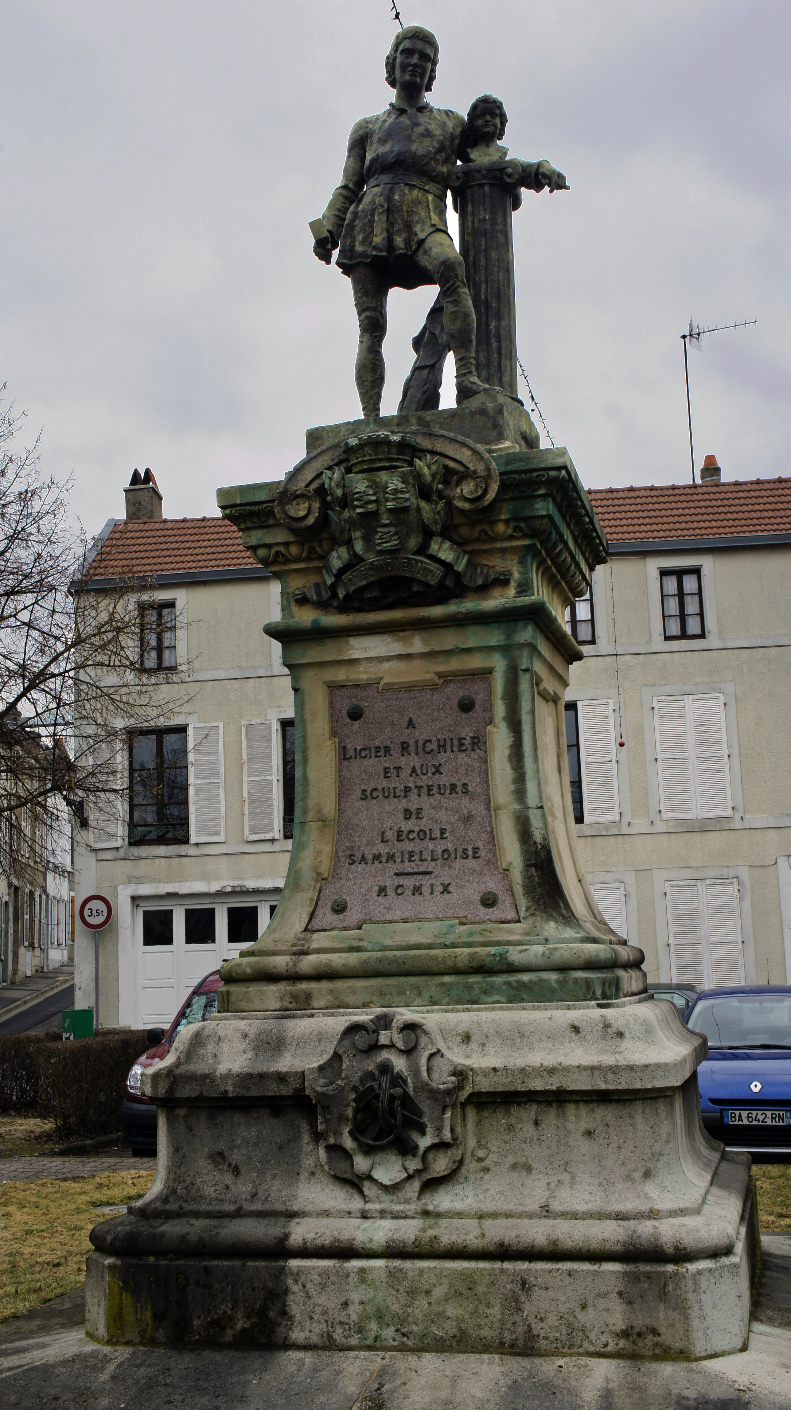 Buste de Ligier Richier à Saint-Mihiel.monument élevé en 1909, Gallant sculpteur, Perin architecte, Vadel statuaire...démontée par les allemands pendant la Première Guerre mondiale, reconstituée en 1934...